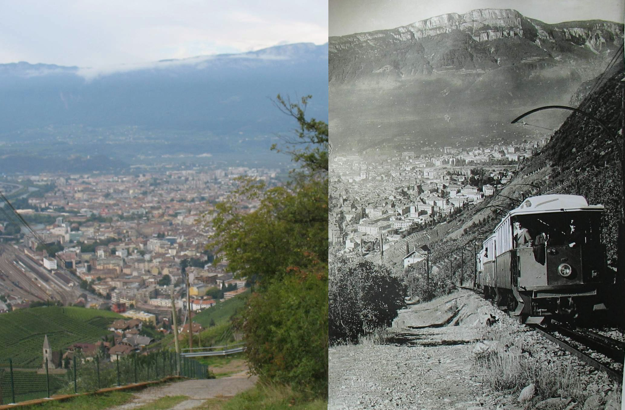 Confronto tracciato cremagliera e attuale - 30/9/07